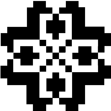 Motif tricot norvégien, tellros